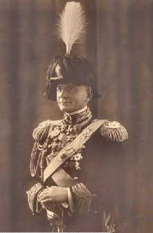 Ritratto del colonnello Cosma Manera in alta uniforme